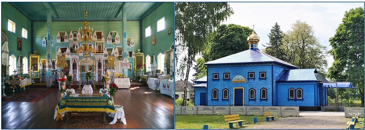 Храм Св. Вознесіння у селі Савин Козелецького району